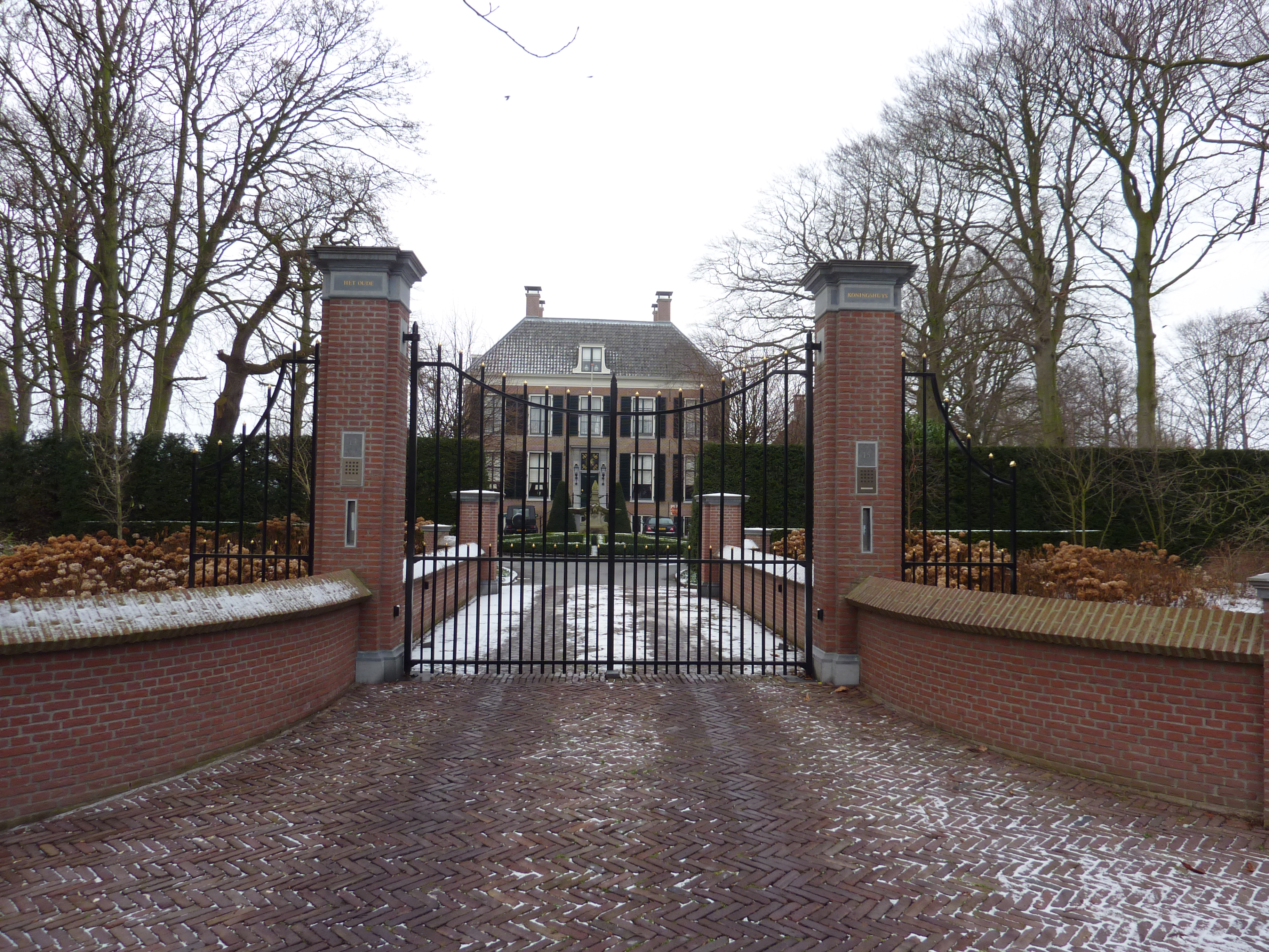 Sassenheim, toegangshek Het Oude Koningshuis